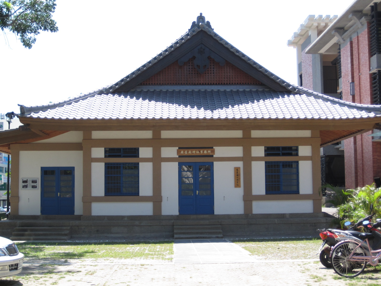 臺南神社事務所，現為忠義國小圖書館。